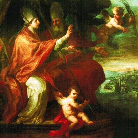 I Santi Erasmo e Marciano - Sebastiano Conca.